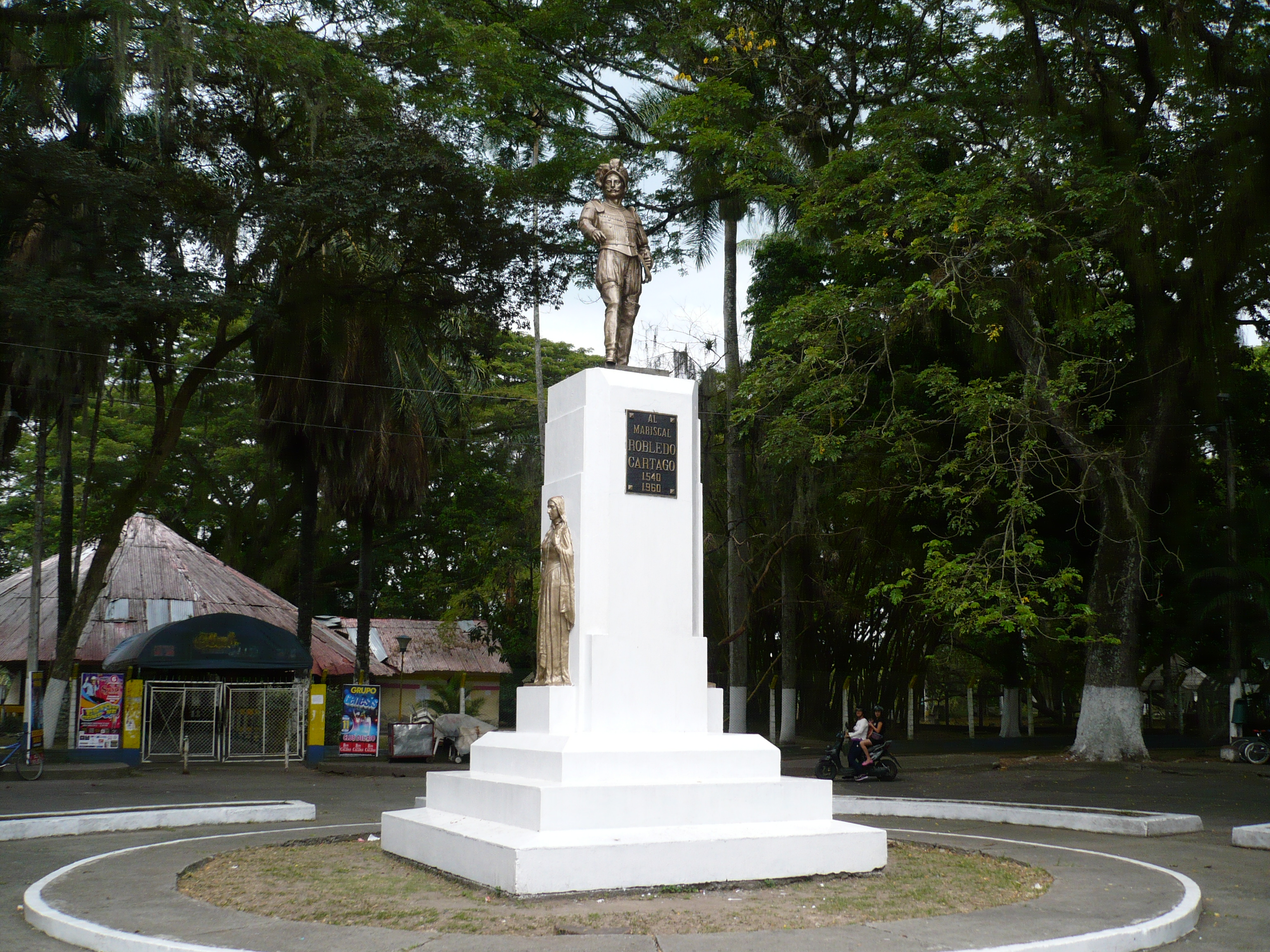 Monumento al Mariscal Robledo, Parque La Isleta. Cartago, Valle, Colombia.